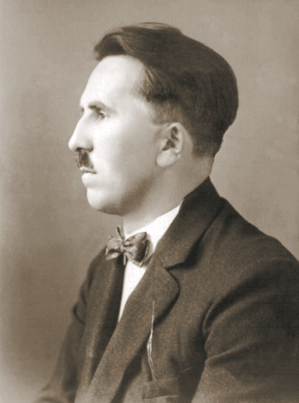 Юрій Полянський, 1930-ті роки [З родинного архіву Полянських]